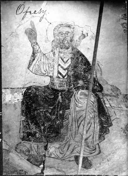 Kalkmålning i absiden. Detalj av mittpartiet. Kategori: (03) KalkmålningarKalkmålning i absiden. Detalj av mittpartiet.